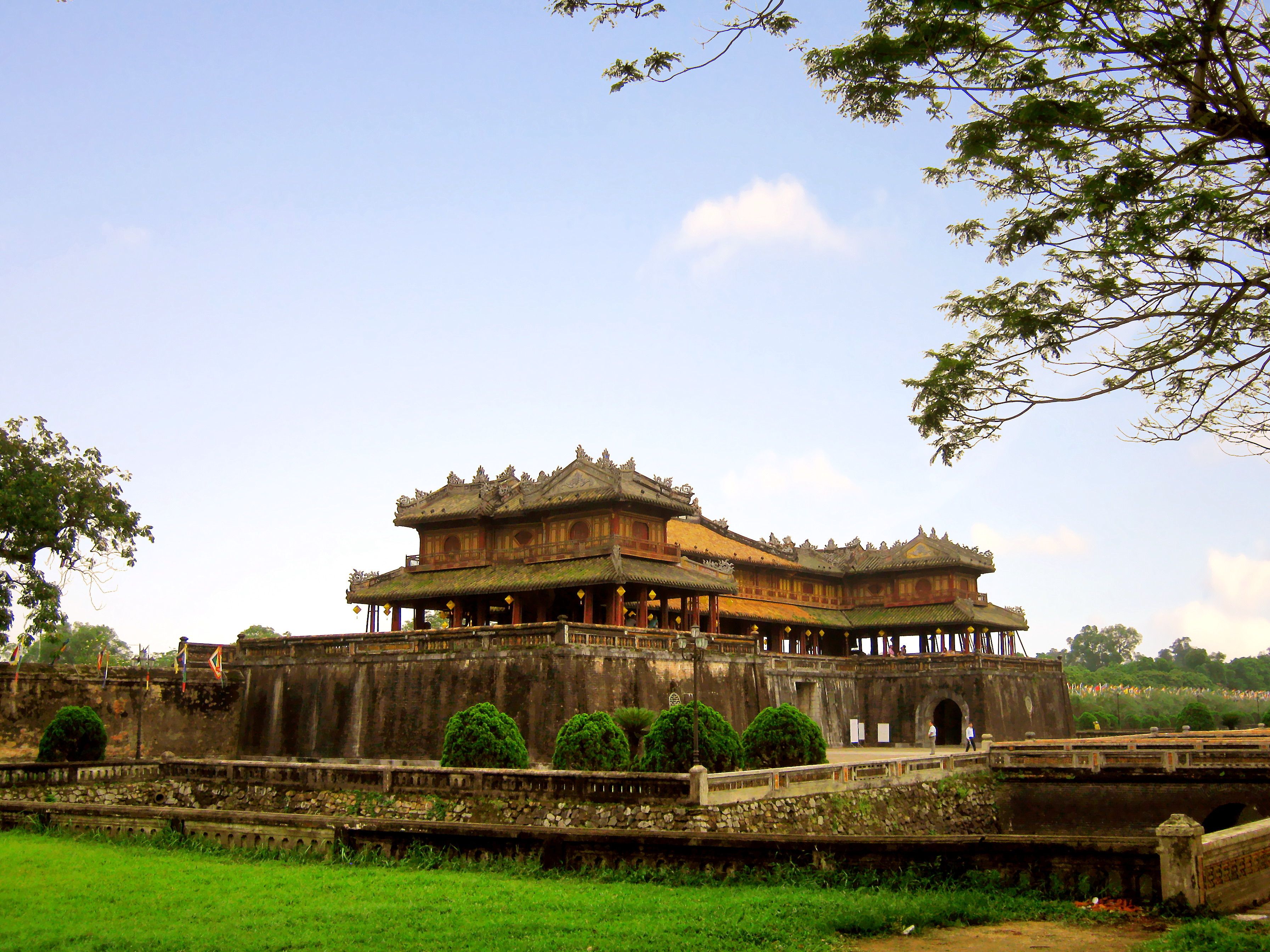 Hoàng thành Huế, Việt Nam.